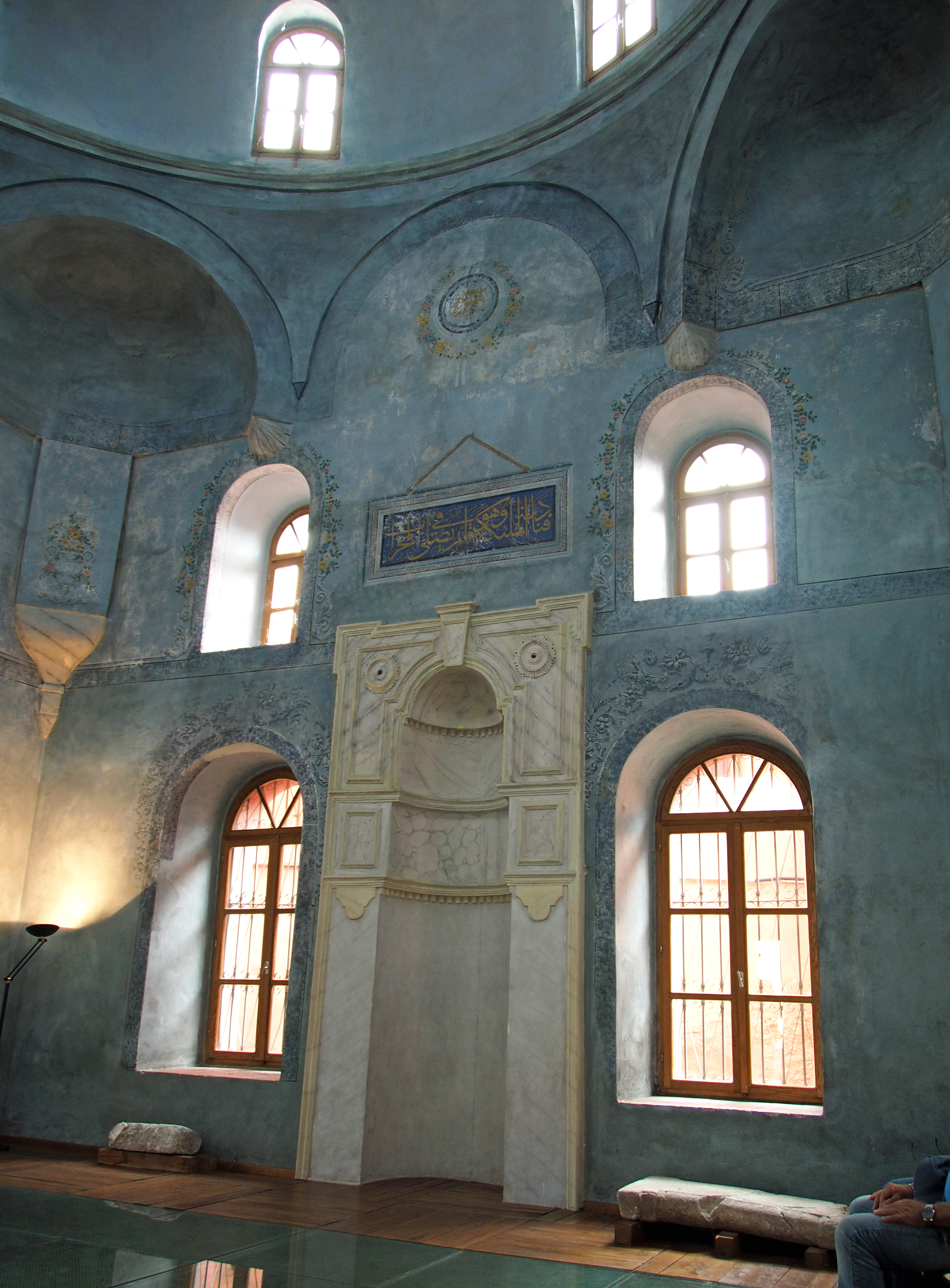 Im Innern der Halil Bey Moschee in Kavala (Griechenland)